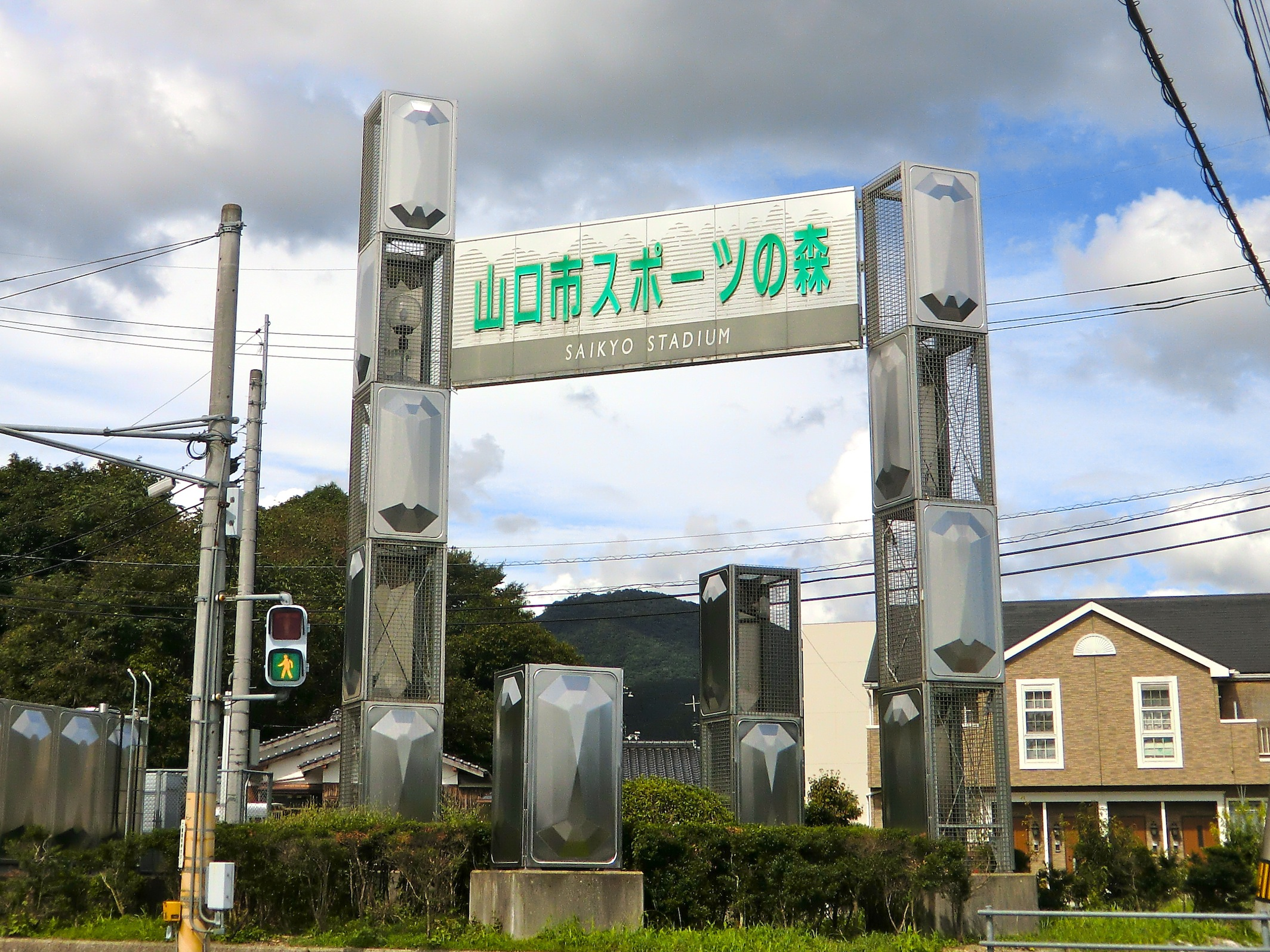 山口スポーツの森の入口（山口県山口市）